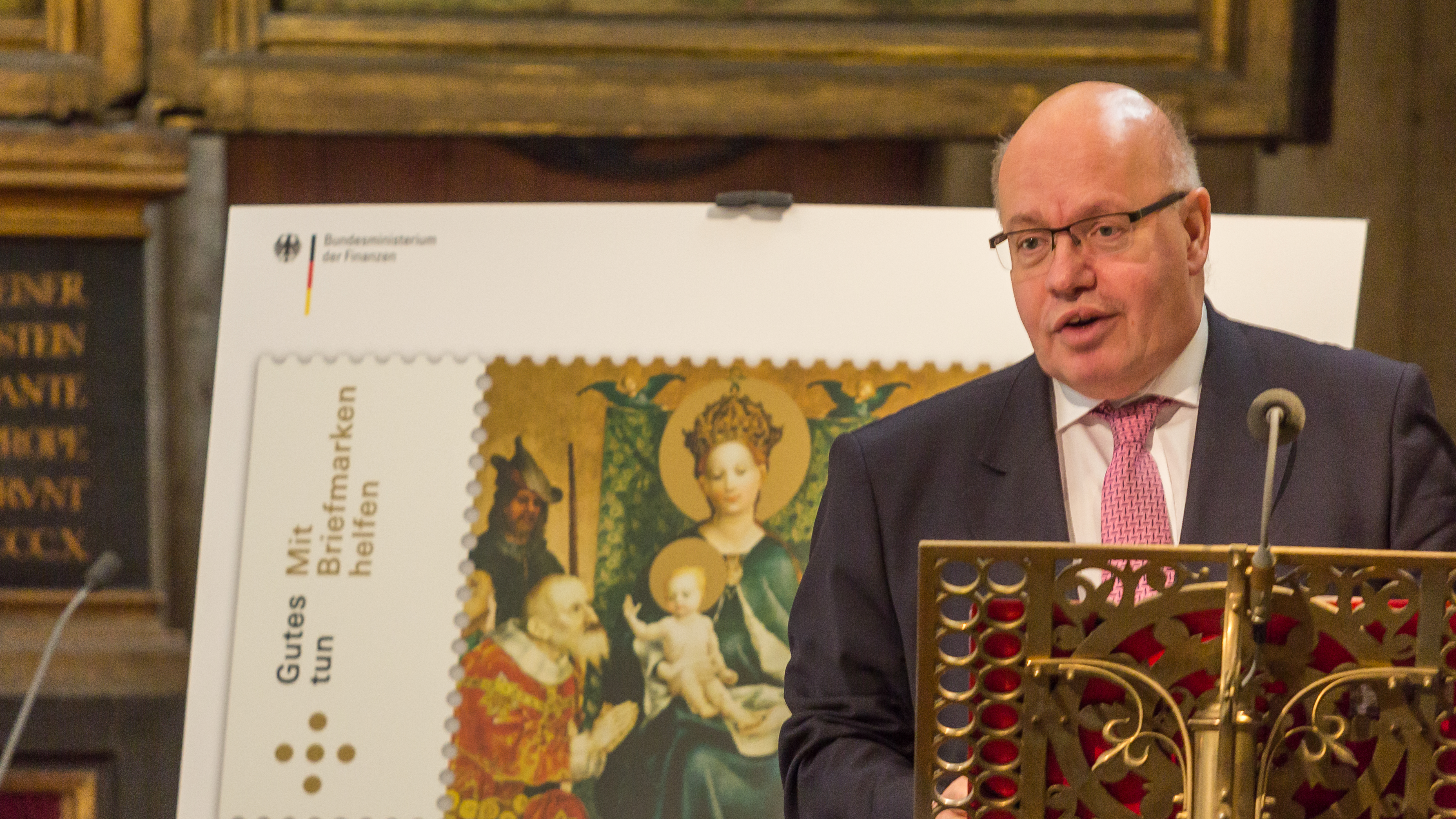 Vorstellung der Sonderbriefmarke „Weihnachten 2017“. Das Postwertzeichen zeigt einen Ausschnitt des von Stefan Lochner gestalteten Altars der Stadtpatrone in der Marienkapelle des Kölner Doms. Foto: Präsentation des Sonderpostwertzeichens: Peter Altmaier, geschäftsführender Bundesminister der Finanzen